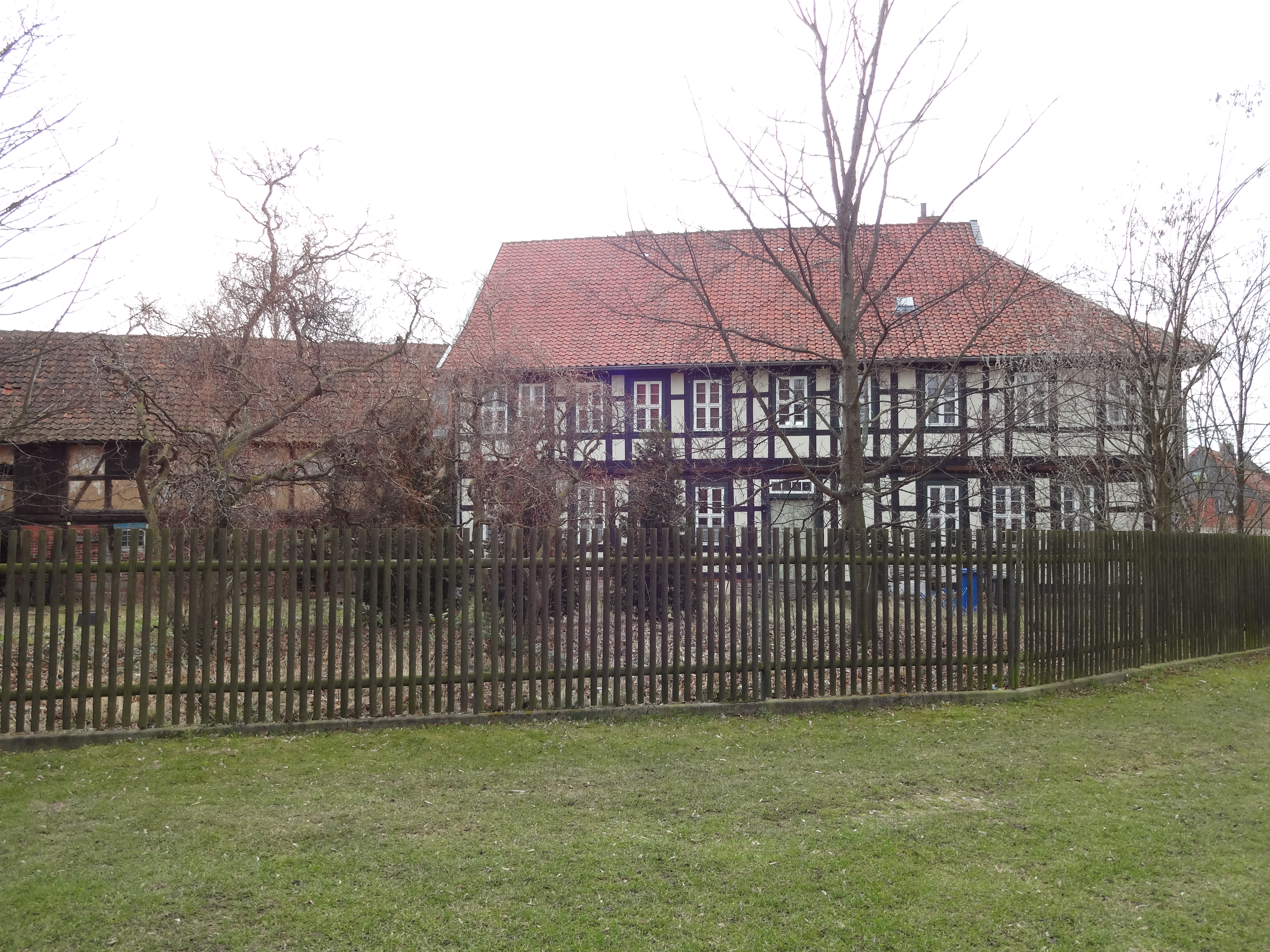 denkmalgeschützter Pfarrhof in der Dorfstraße 32 in Reddeber, Ortsteil von Wernigerode